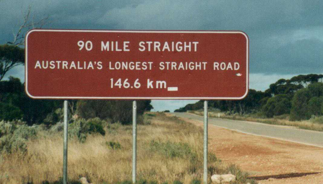 Nullarbour Roadsign*